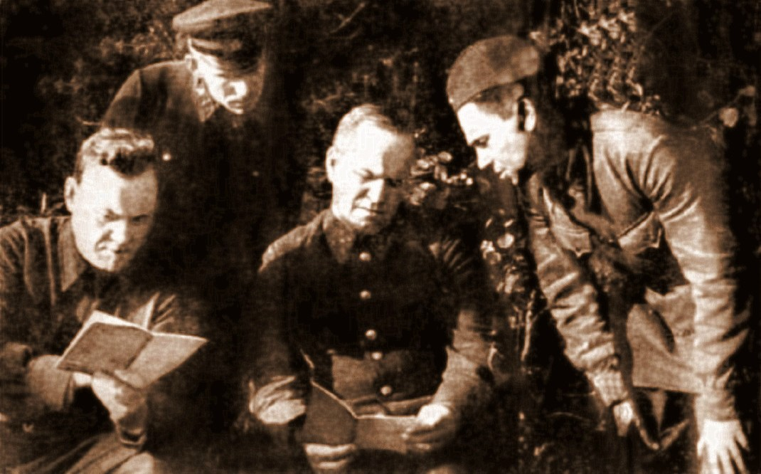 военный корреспондент газеты «Правда» Пётр Лидов (справа) показывает генералу армии Г.К. Жукову и члену военного совета Западного фронта Н.А. Булганину экземпляры только что вышедшей брошюры «Таня». Эта фотография была опубликована в газете «Правда» 22 июня 1944 года, в день гибели П. Лидова